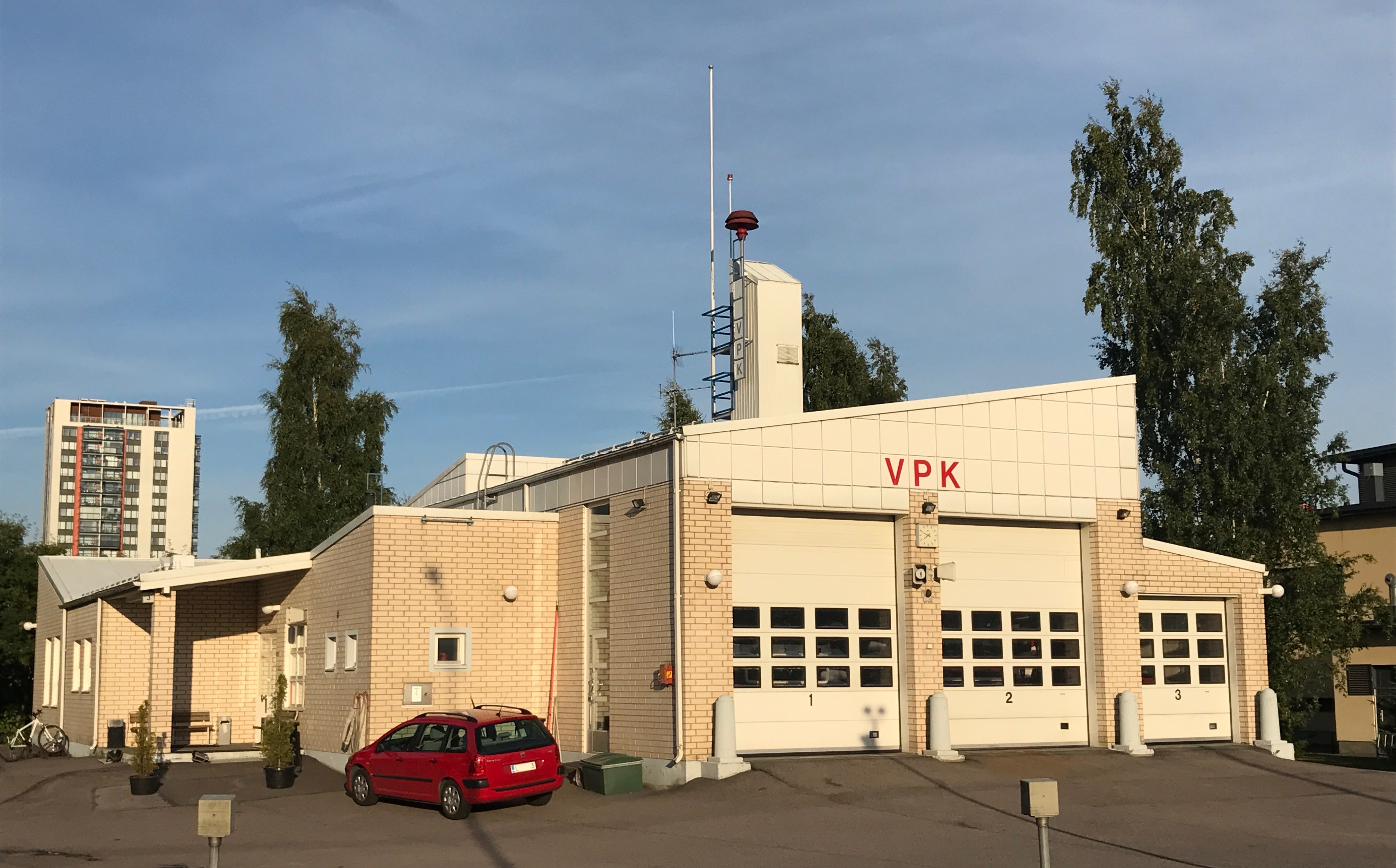 Leppävaaran VPK:n paloasema Espoon Leppävaarassa.